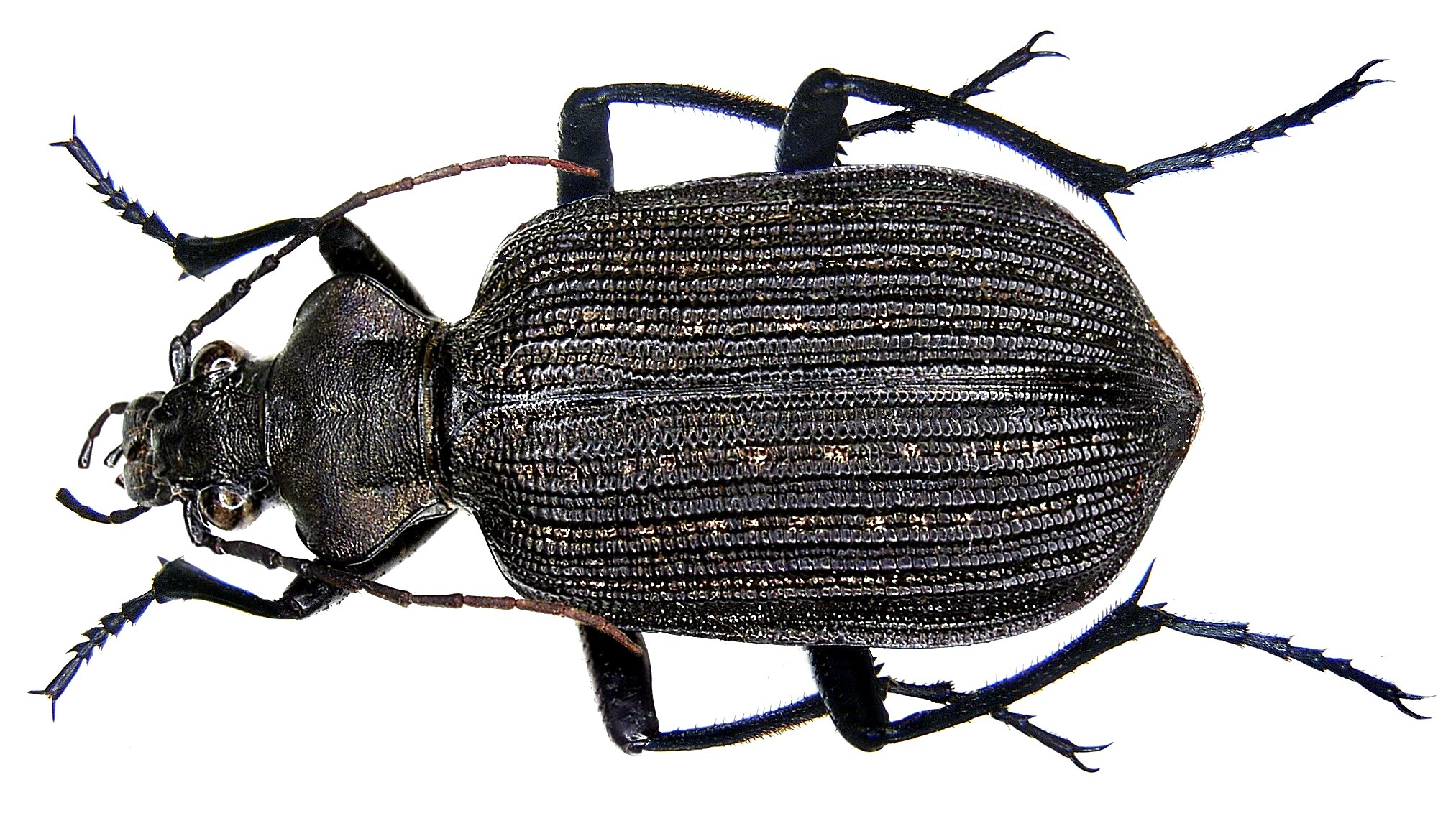 Familie: Carabidae Groesse: 22-27 mm Verbreitung: Ostafrika, Westafrika Fundort: Kenia, Tsavo National Park leg. U.Schmidt, 1991; det. W.Lorenz, 2000 Photo: U.Schmidt, 2006